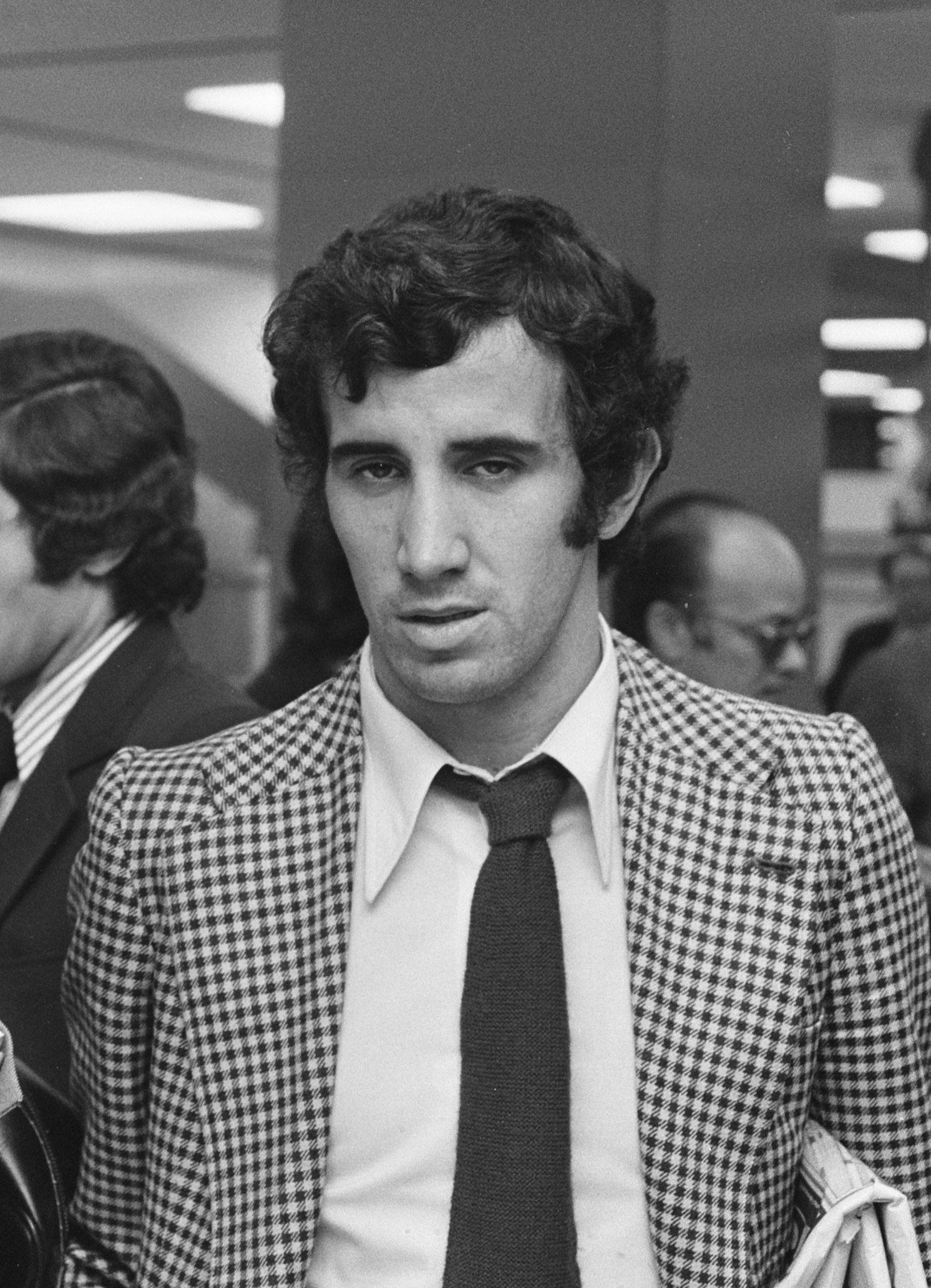 Spaans Nationaal Team op Schiphol, Irureta ( Atletico Madrid )